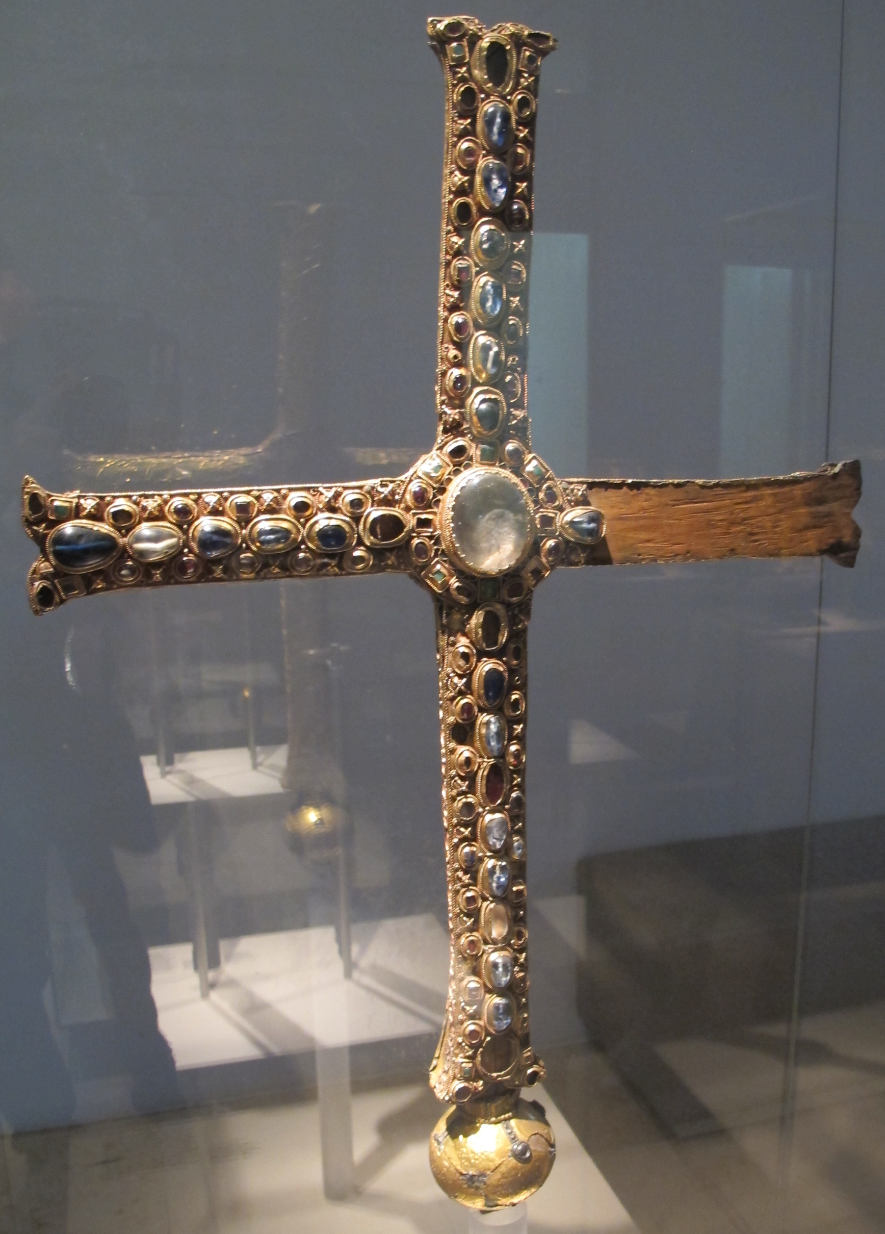 Ardennenkreuz (croce processionale), francia del nord o germania occ.le, 825-850 ca